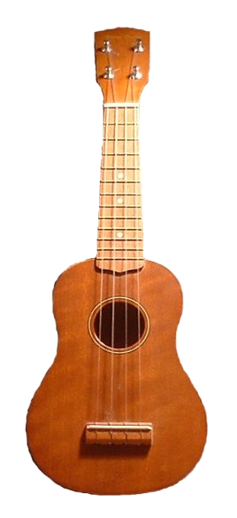 Ukulele